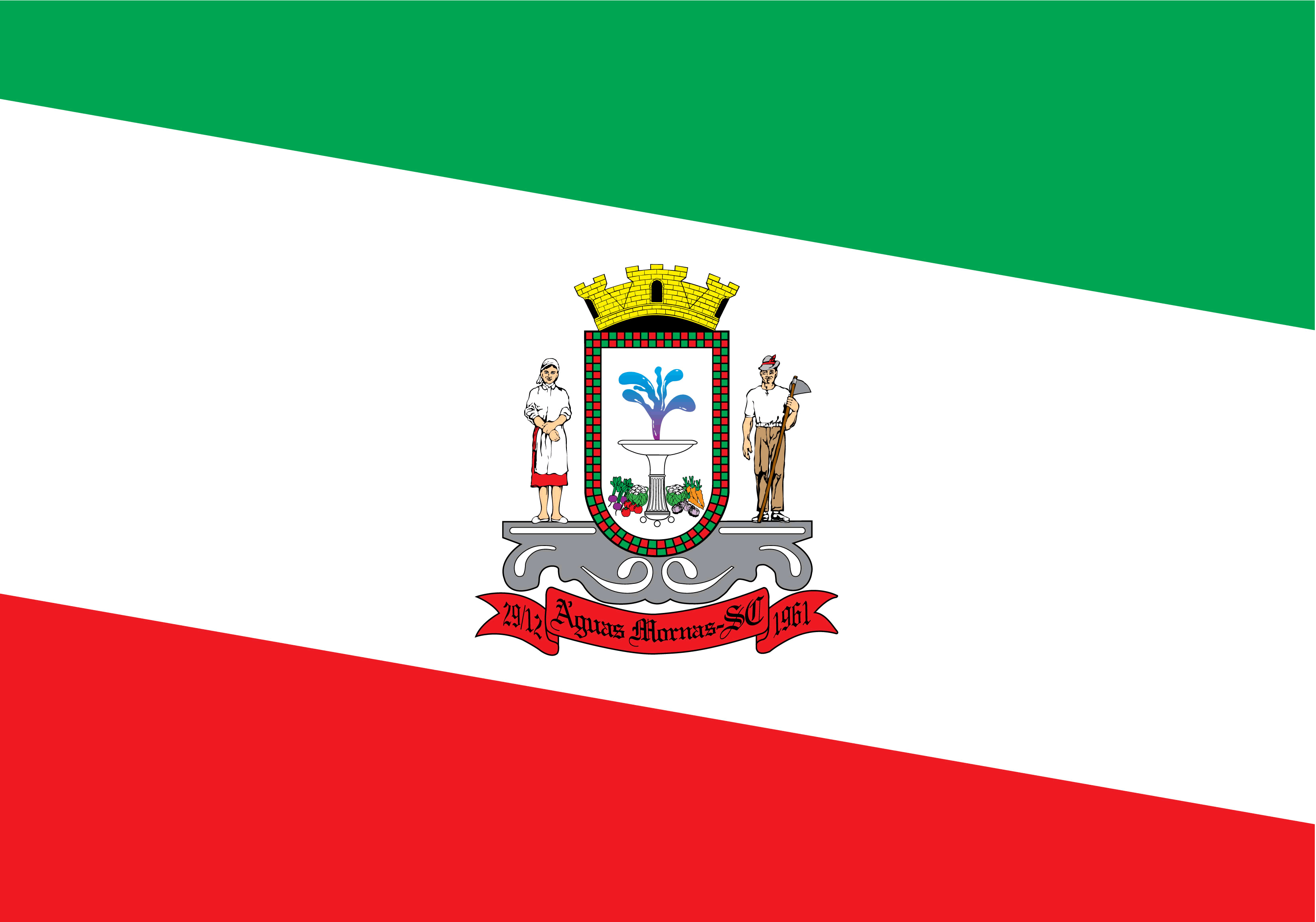 Bandeira do Município de Águas Mornas - Santa Catarina - Brasil